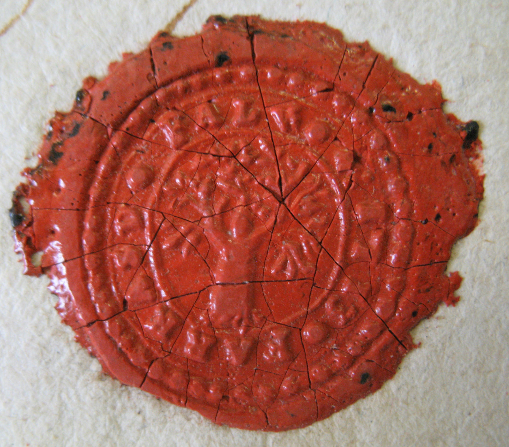 Vágfarkasd pecsét 1795-ből (ŠA Nr, NŽ Nob, III 186 Deák)